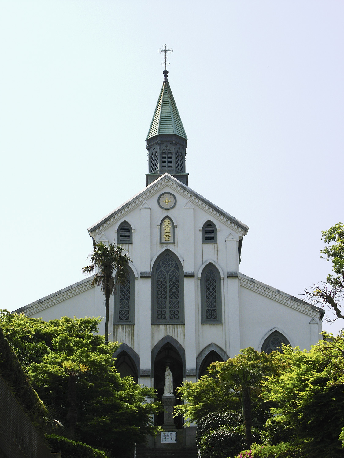 Oura Church, Nagasaki, Japan Oura Church, Nagasaki, Japan